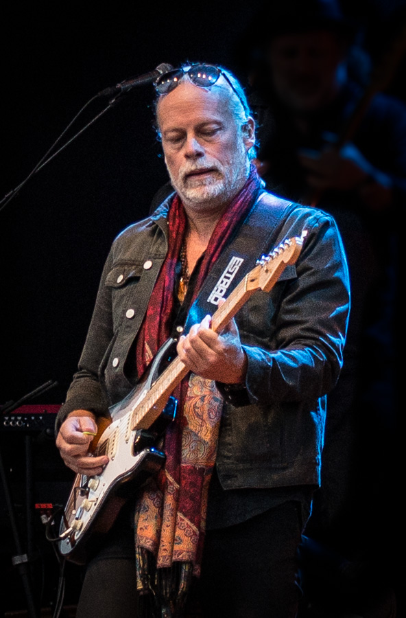 Sven-Ingvars uppträder inför en fulltalig publik på Gröna Lund i Stockholm den 12 augusti 2016. Staffan Enestam på gitarr.